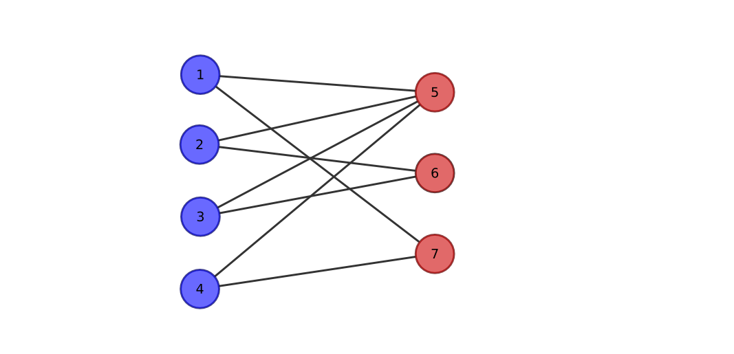 Red Bipartita